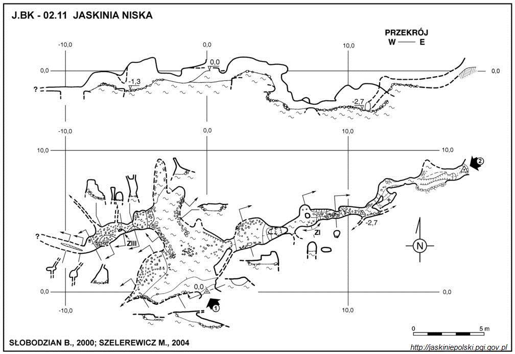 Jaskinia Niska na Zakrzówku - plan